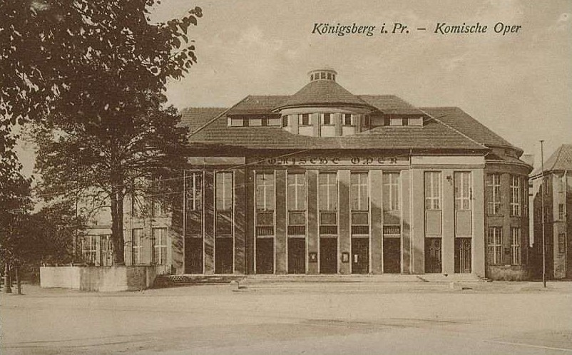 Komische Oper (ehem. Neues Luisentheater) in Königsberg, Ostpreußen; nach 1945 stark verändert wiederaufgebaut